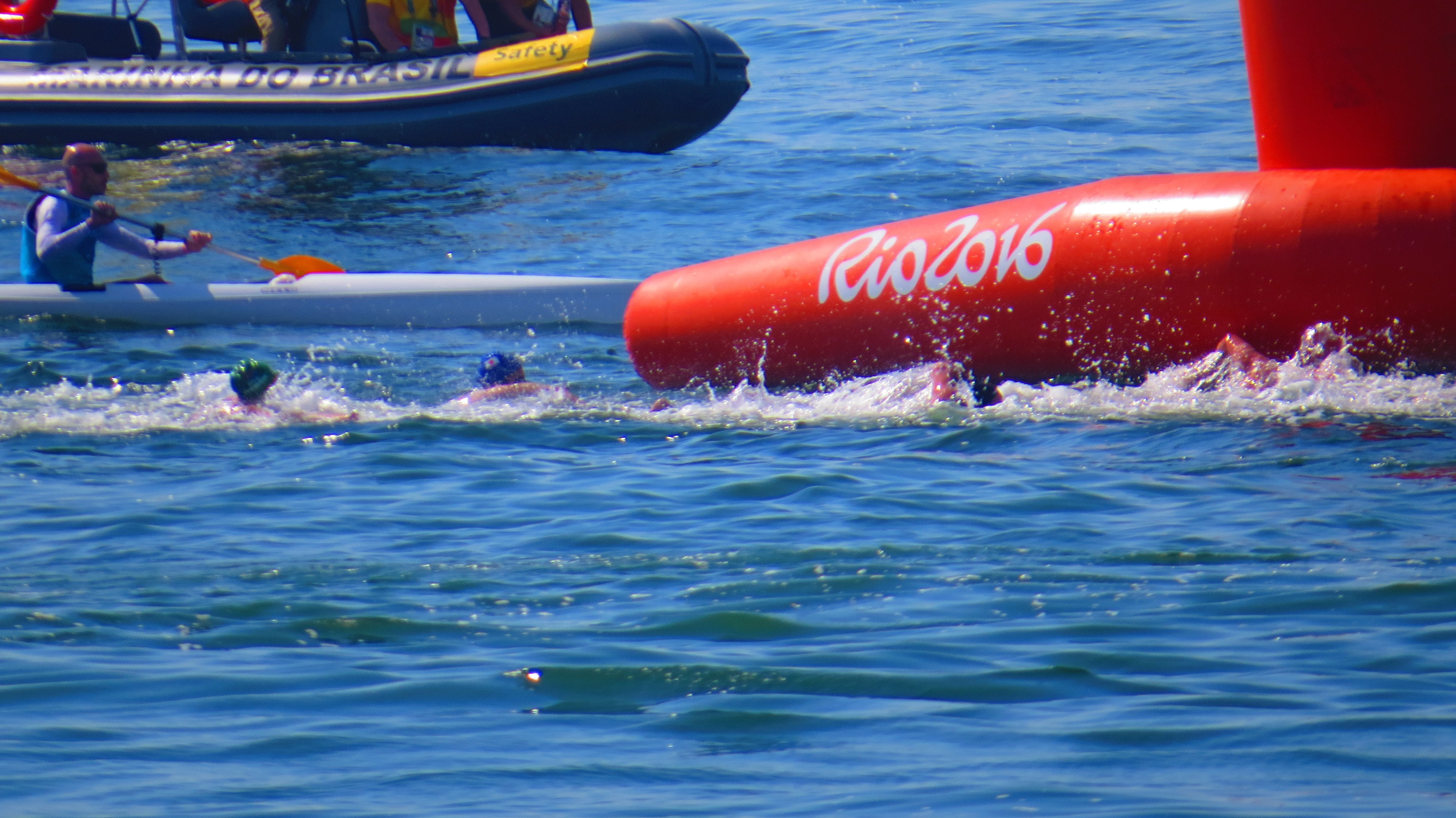 sx50